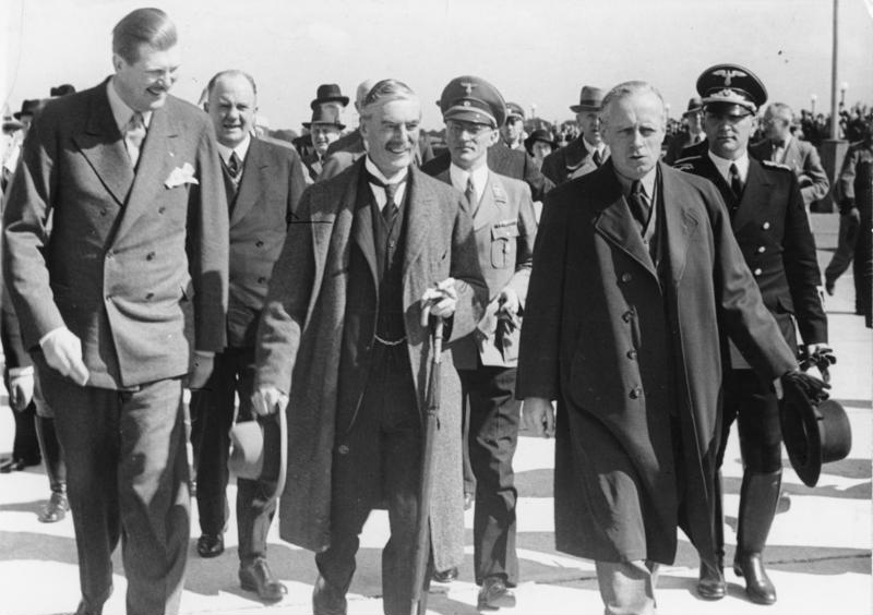 Ministerpräsdiendt Chamberlain ist, nachdem er mit dem Führer und Reichskanzler auf dem Obersalzberg eine Unterredung über die politische Lage hatte, am Freitag mittag wieder vom Münchener Flugplatz Oberwiesenfeld nach London abgeflogen. UBz: v.l.n.r. der Chef des Protokolls Frhr. von Doernberg, Ministerpräsident Chamberlain, Reichsaussenminister von Ribbentrop, 2. Reihe v.l. Dolmetscher Paul Otto Gustav Schmidt und Karl Fiehler, Oberbürgermeister von München. Fot. : 16.9.38 12280-38 [Scherl Bilderdienst] Information added by Wikimedia users.Prime Minister Neville Chamberlain (centre) leaves for home after meeting with Adolf Hitler at Berchtesgaden, 16 September 1938 German Foreign Minister Joachim von Ribbentrop visible at right.